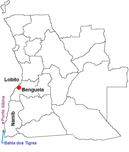 Ciutats i accidents geogràfics del sud de la costa de Namíbia